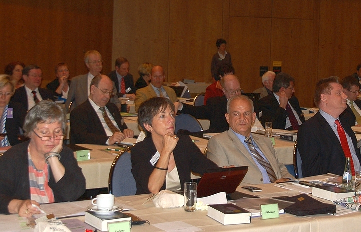 Mitglieder des Rates der Evangelischen Kirche in Deutschland (EKD) im Plenum während der EKD-Synode vom April/Mai 2009 in Würzburg, Deutschland. In der vorderen Reihe, 2. von links: Margot Käßmann, Landesbischöfin der Hannoverschen Landeskirche. In der vorderen Reihe außerdem (von rechts nach links): Hermann Gröhe, CDU-Politiker, und Peter Hahne, deutscher Fernsehmoderator.